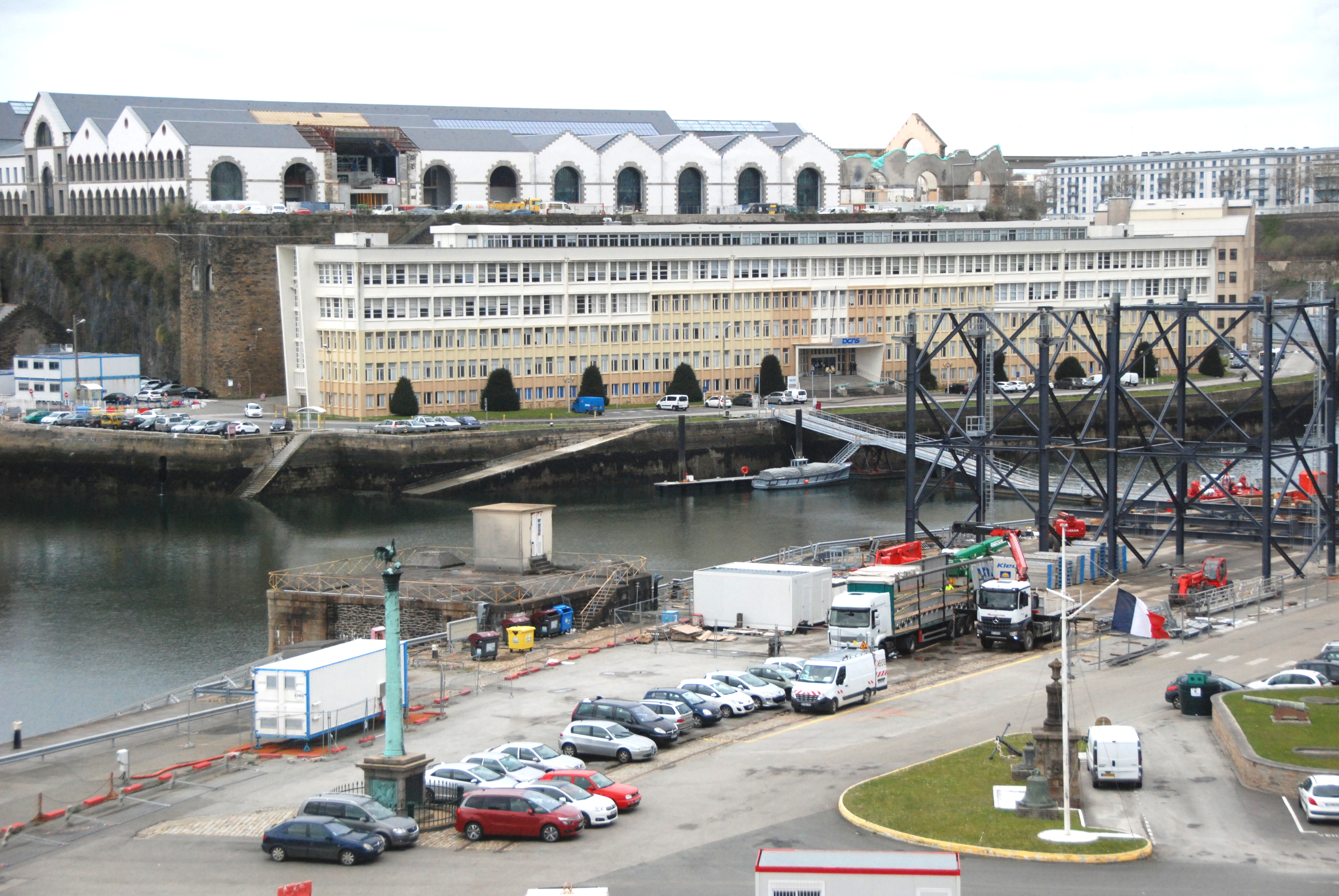 Etat des travaux du pylone et de la gare des Capucins